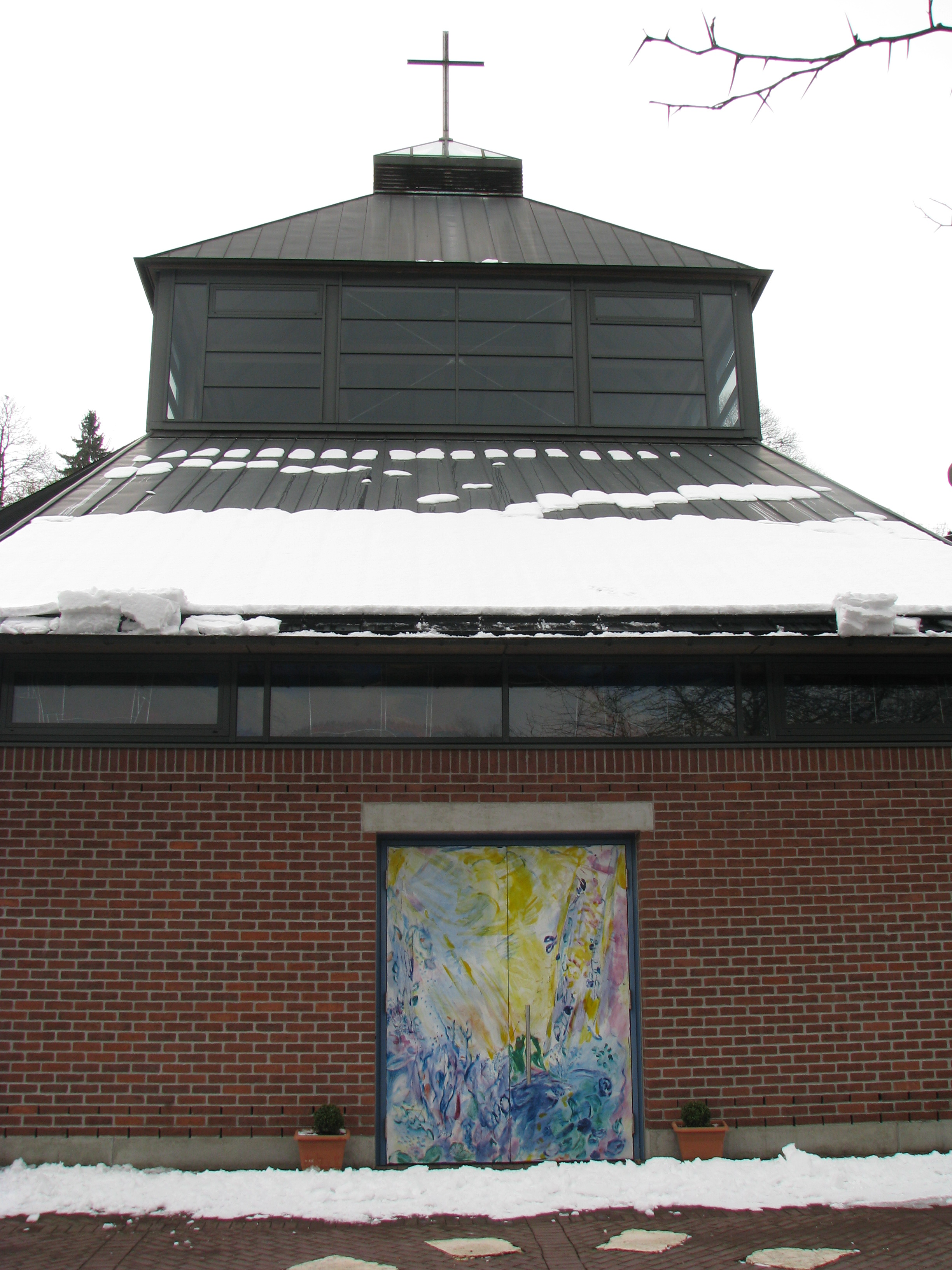 Kath. Kirche St. Teresa in Heidelberg-Ziegelhausen, erbaut 1995-97, Architekt: Werner Wolf-Holzäpfel